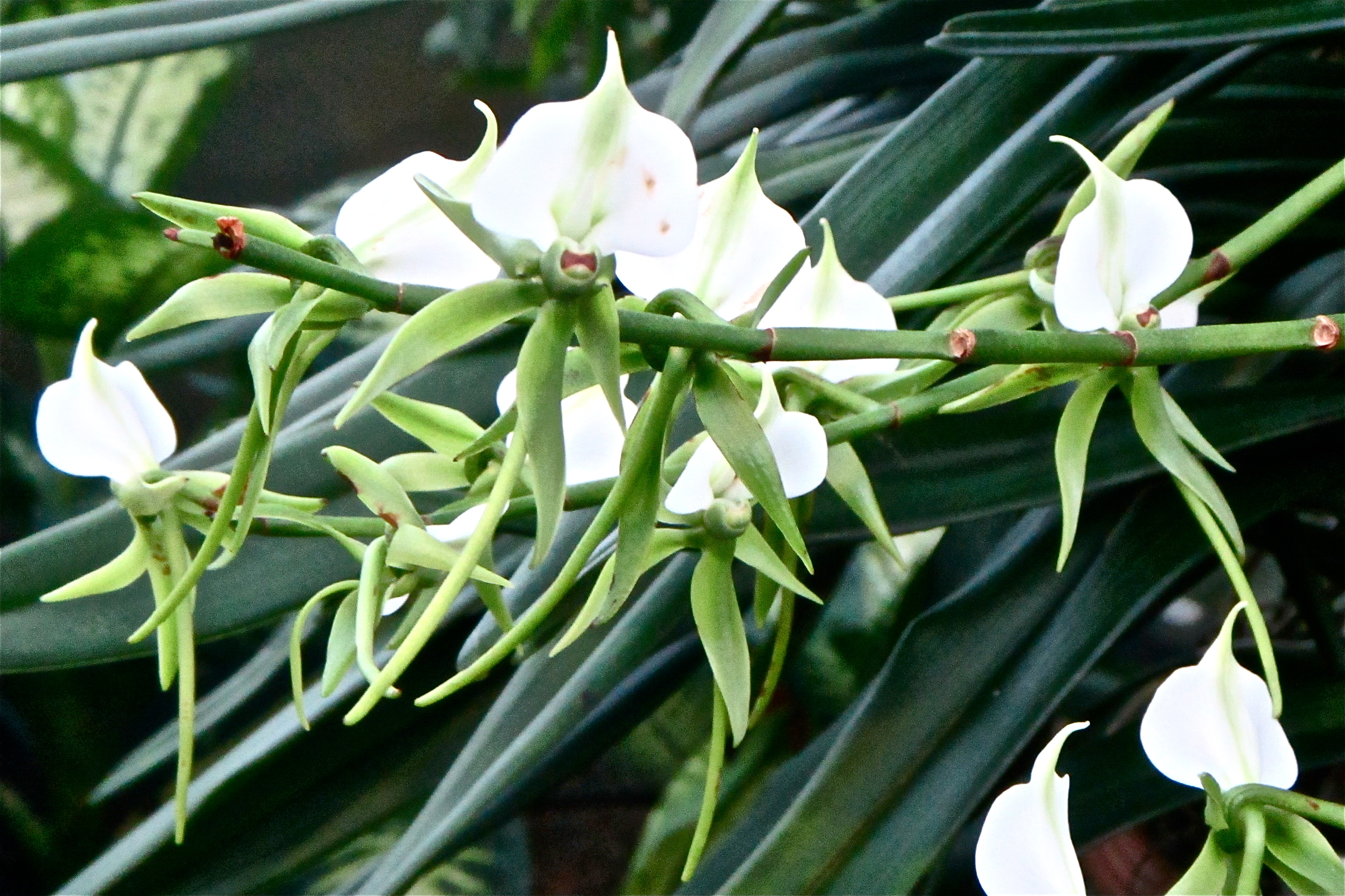 Jardin botanique de Montréal.